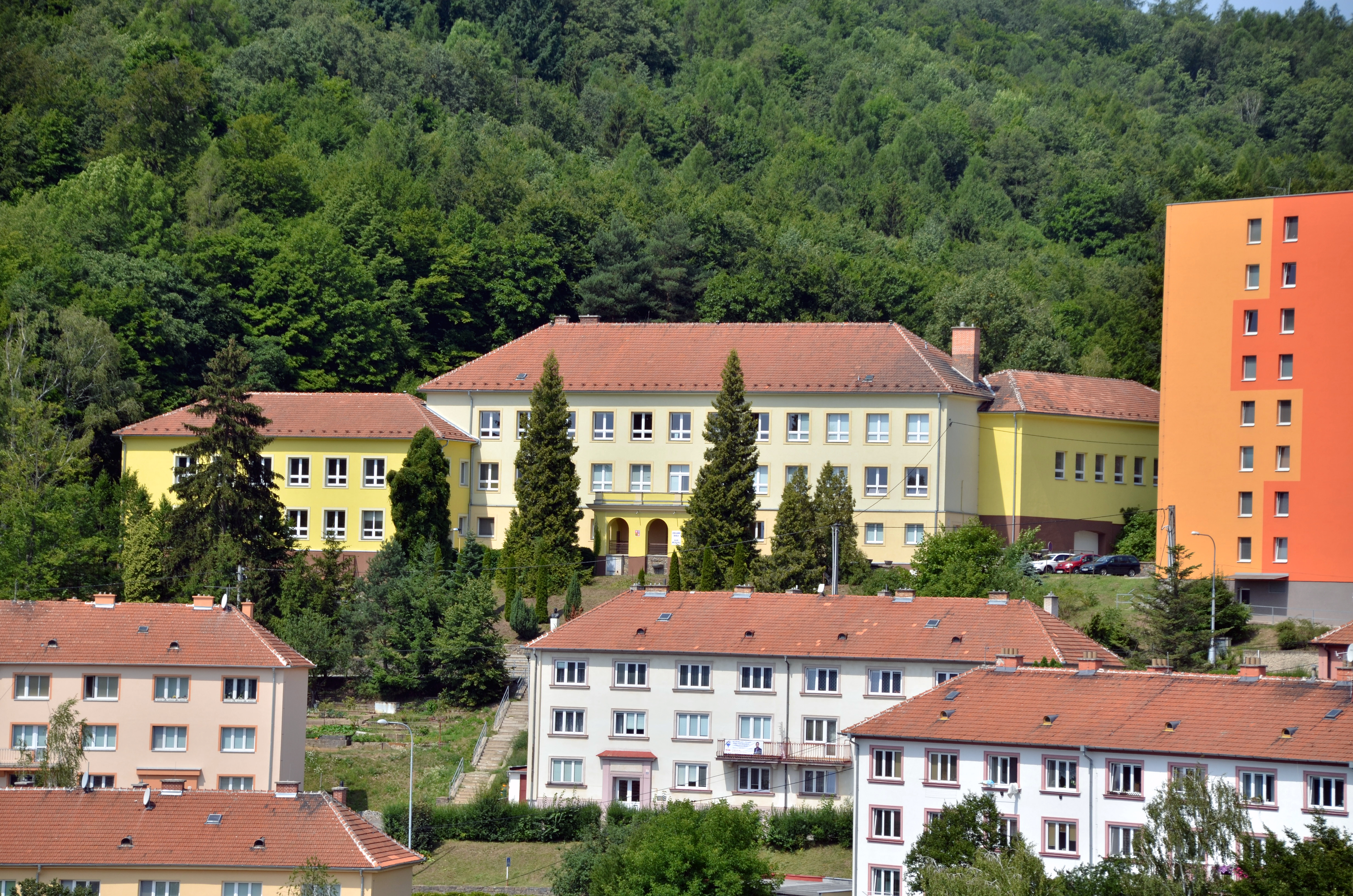 Základní škola v Adamově na ulici Ronovská